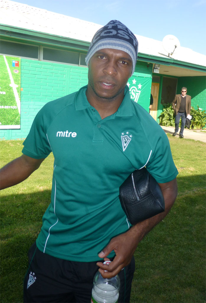 Fotografia de Tressor Moreno, jugador colombiano profesional de futbol que actualmente juega por el Santiago Wanderers de Chile. Ademas ha sido seleccionado nacional de su pais.